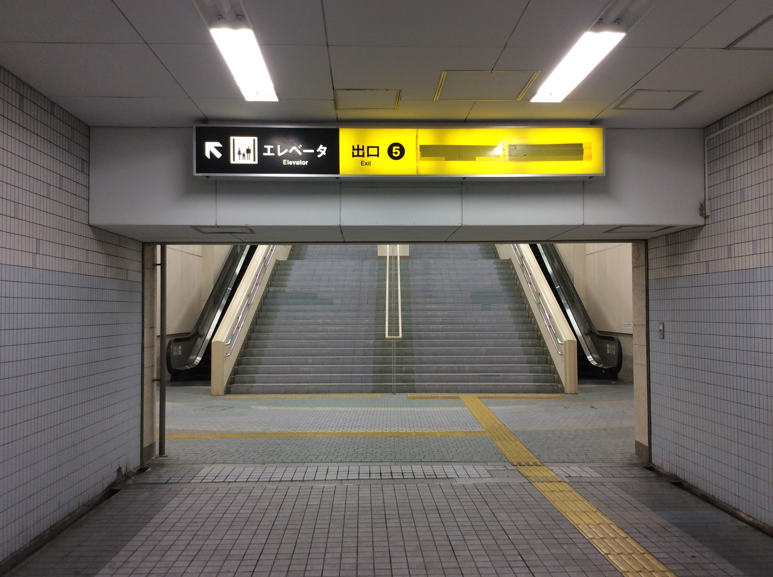 Osaka Metro 動物園前駅の出入口